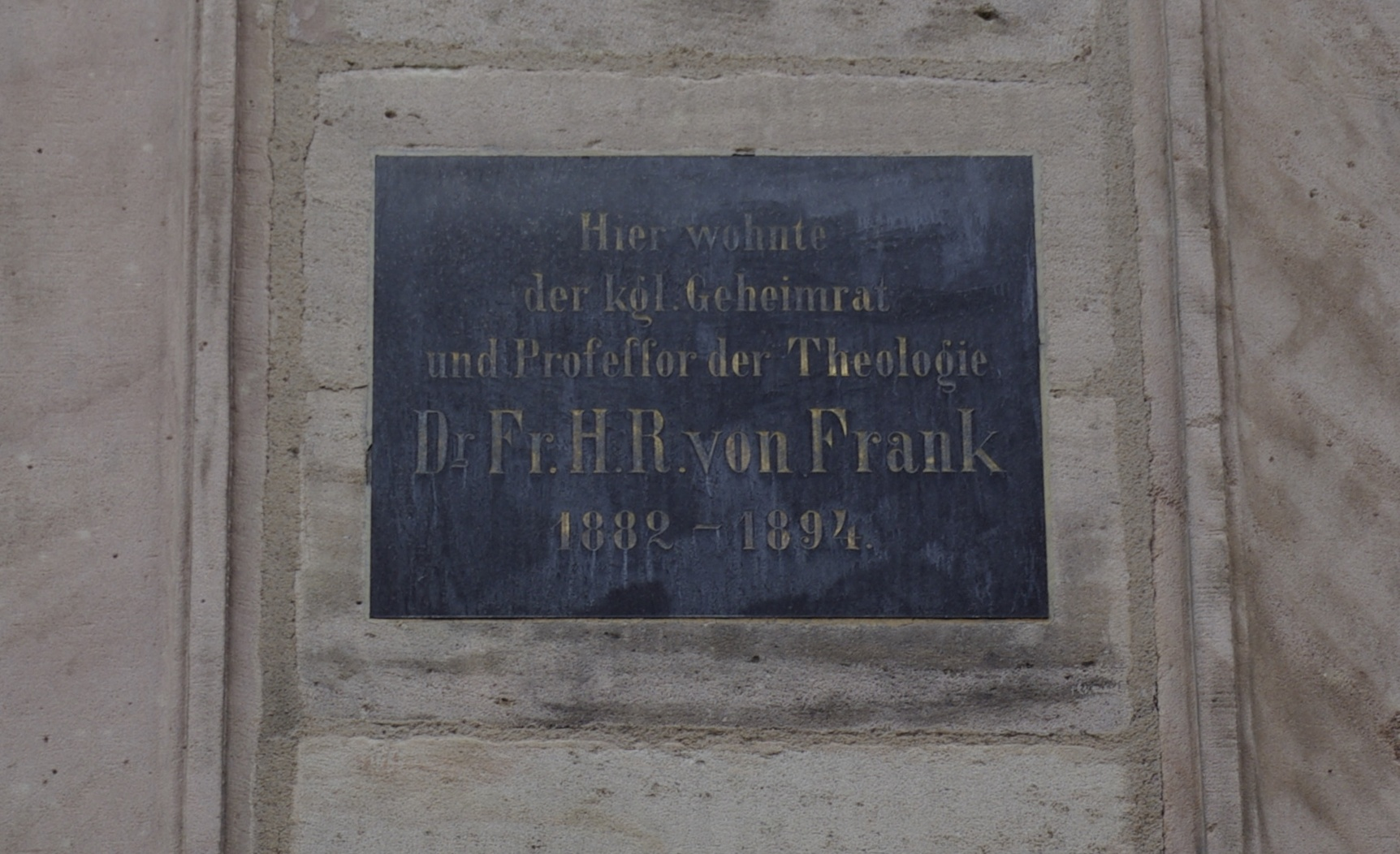 Gedenktafel für Franz Hermann Reinhold Frank am Haus Hauptstraße 13 in Erlangen